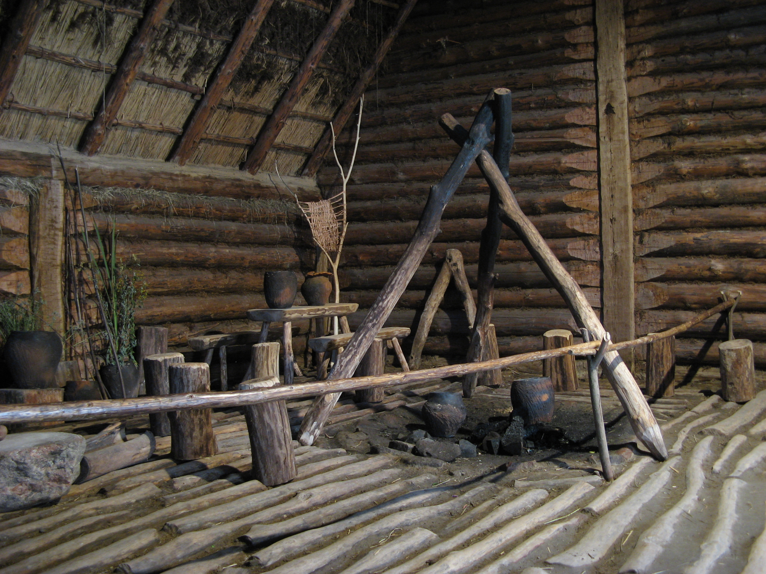 Biskupin - archeopark, rekonstrukce osady z doby bronzové. Jedna z řady "bytových jednotek" v chatě, ohniště (kuchyňský kout). Rekonstrukce